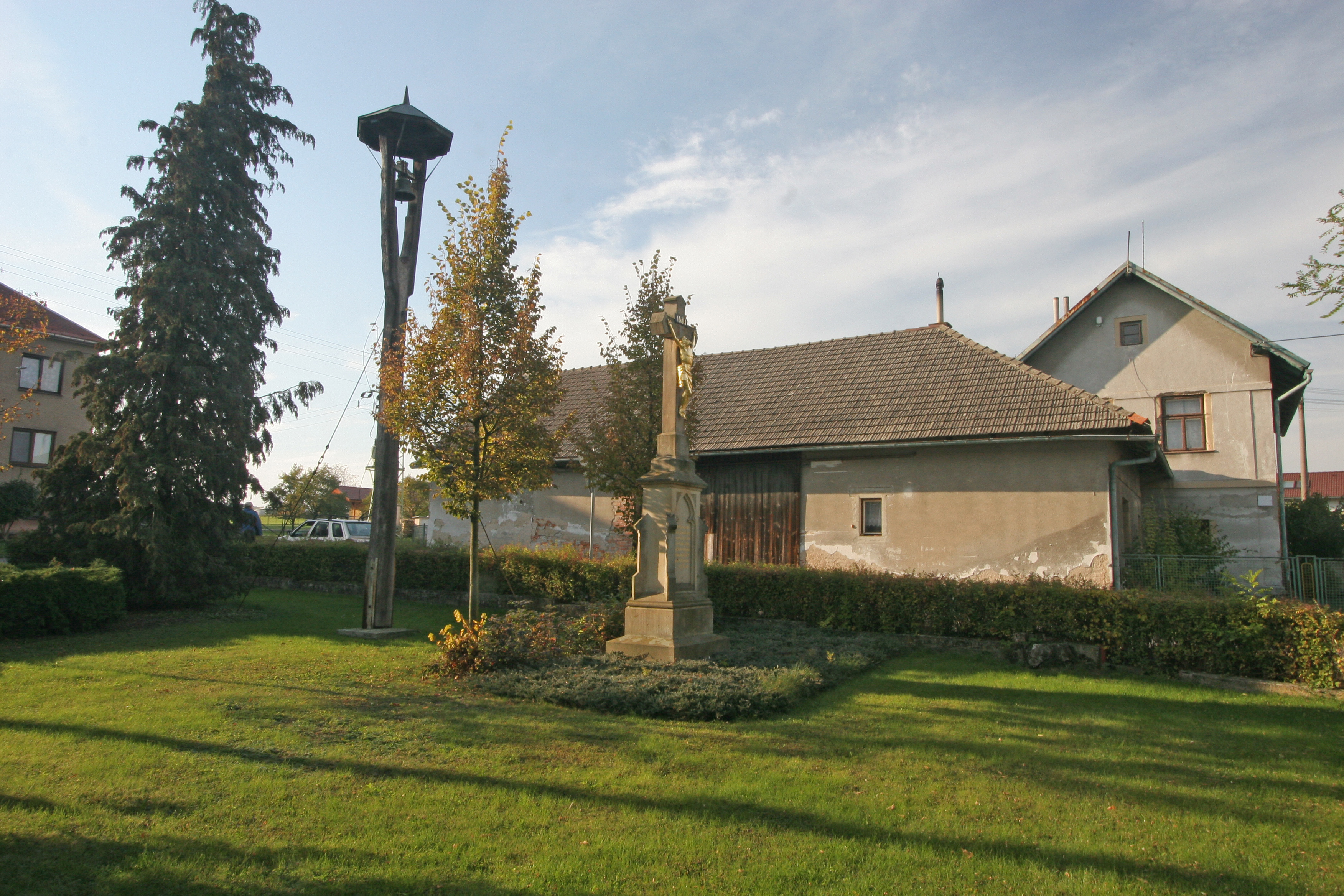 Jílovice zvonička a křížek